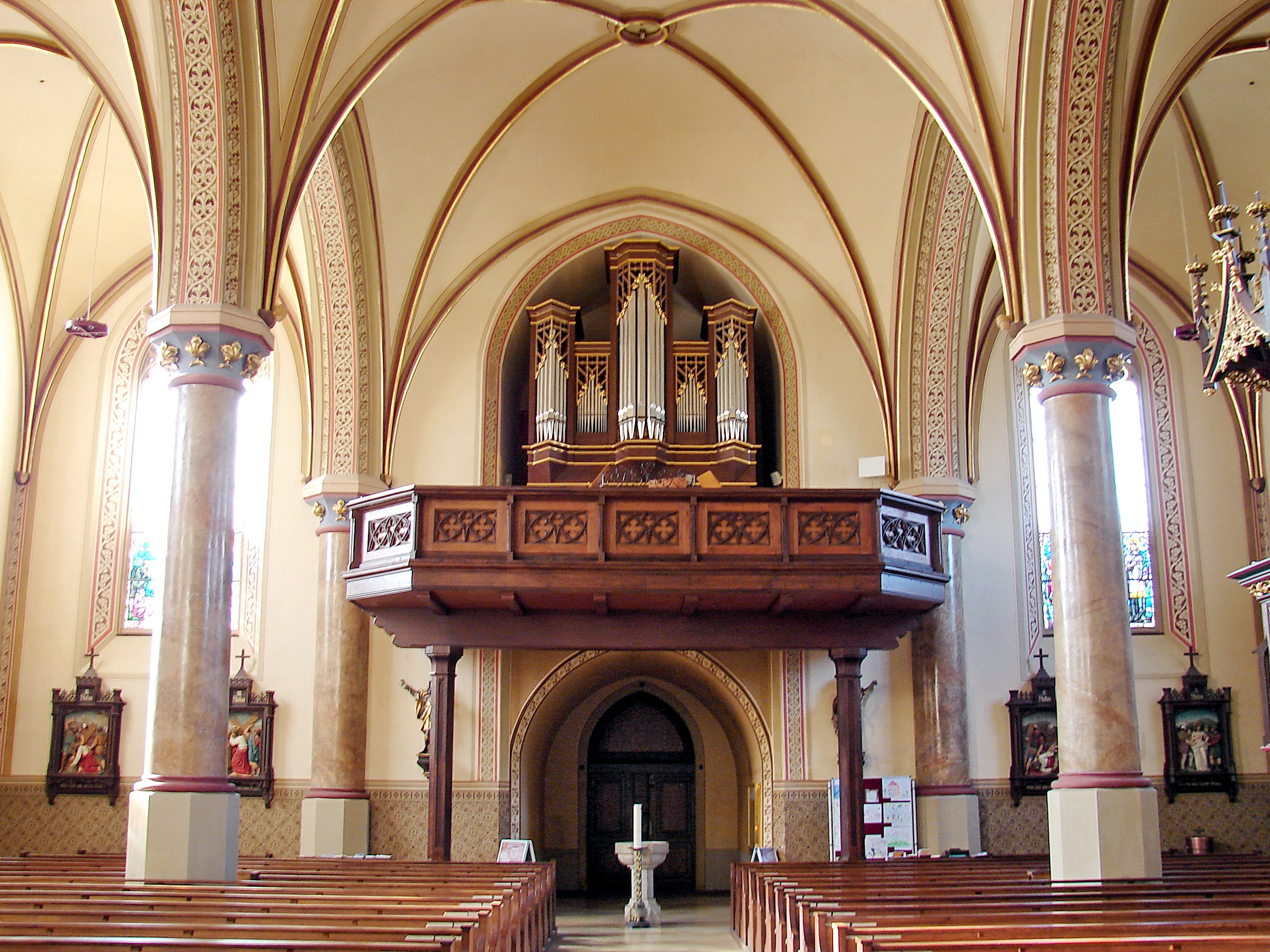 Pfarrkirche Mariä Himmelfahrt in Garmisch-Partenkirchen